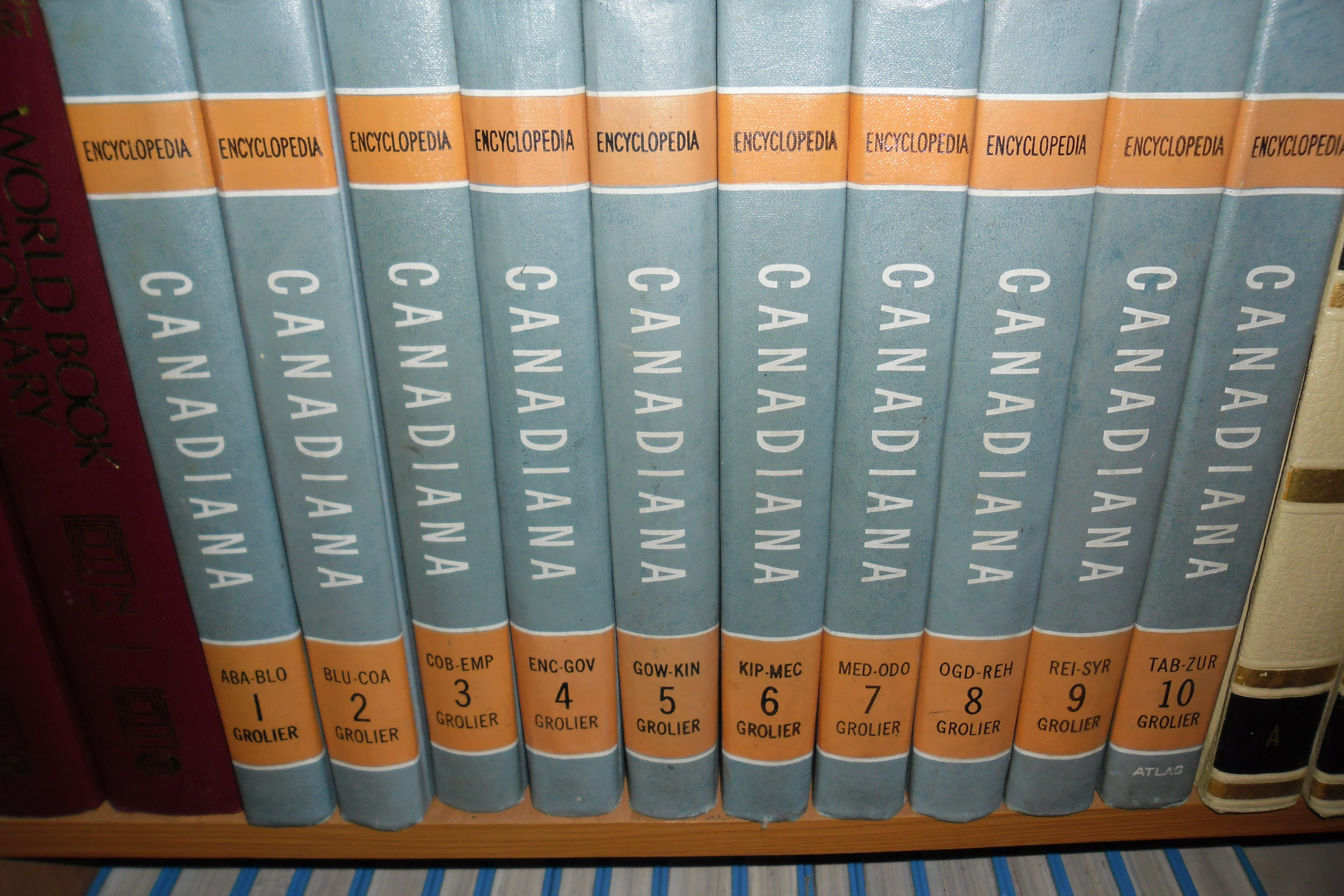 Канадіана